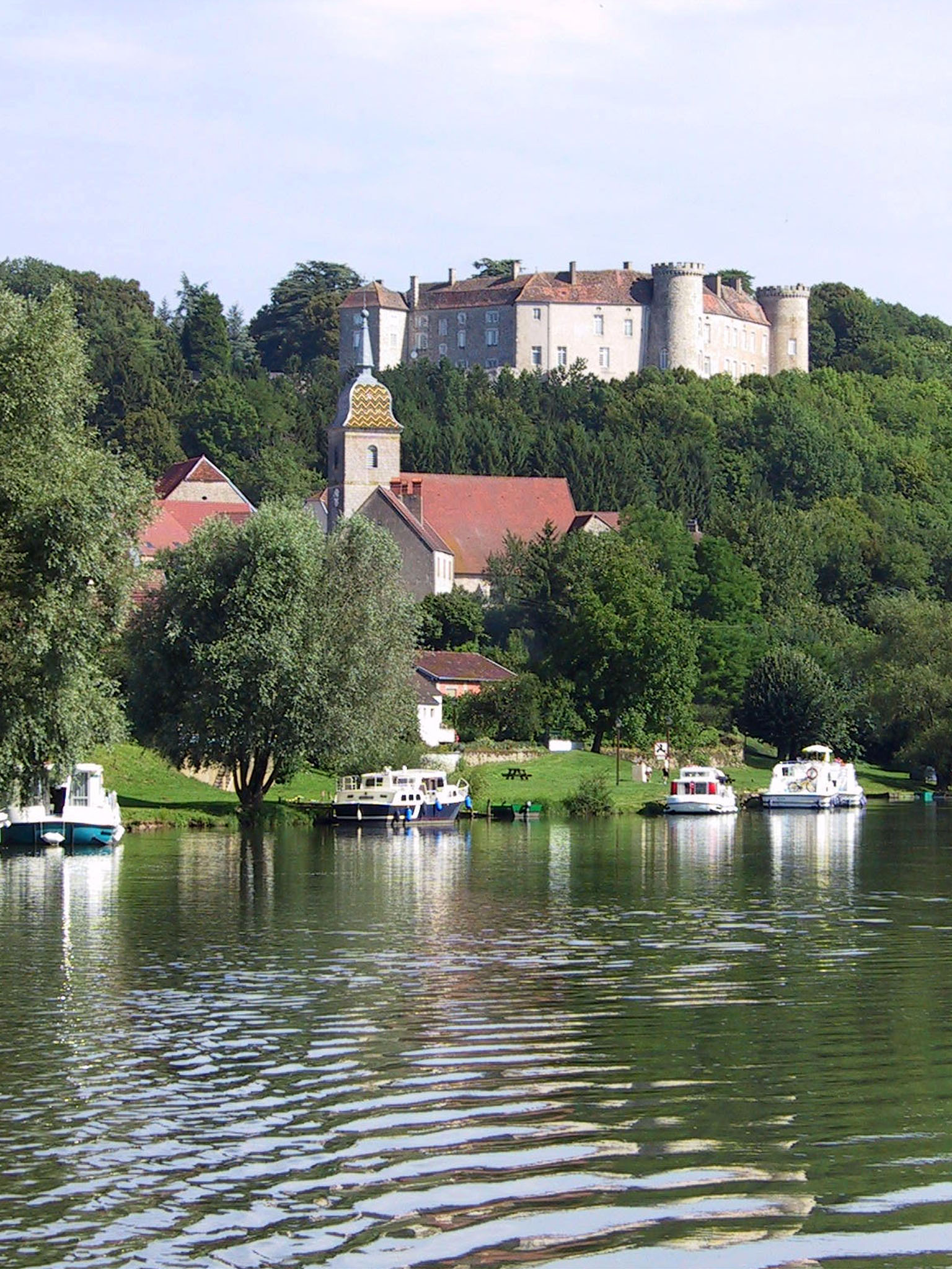 Ray-sur-Saône